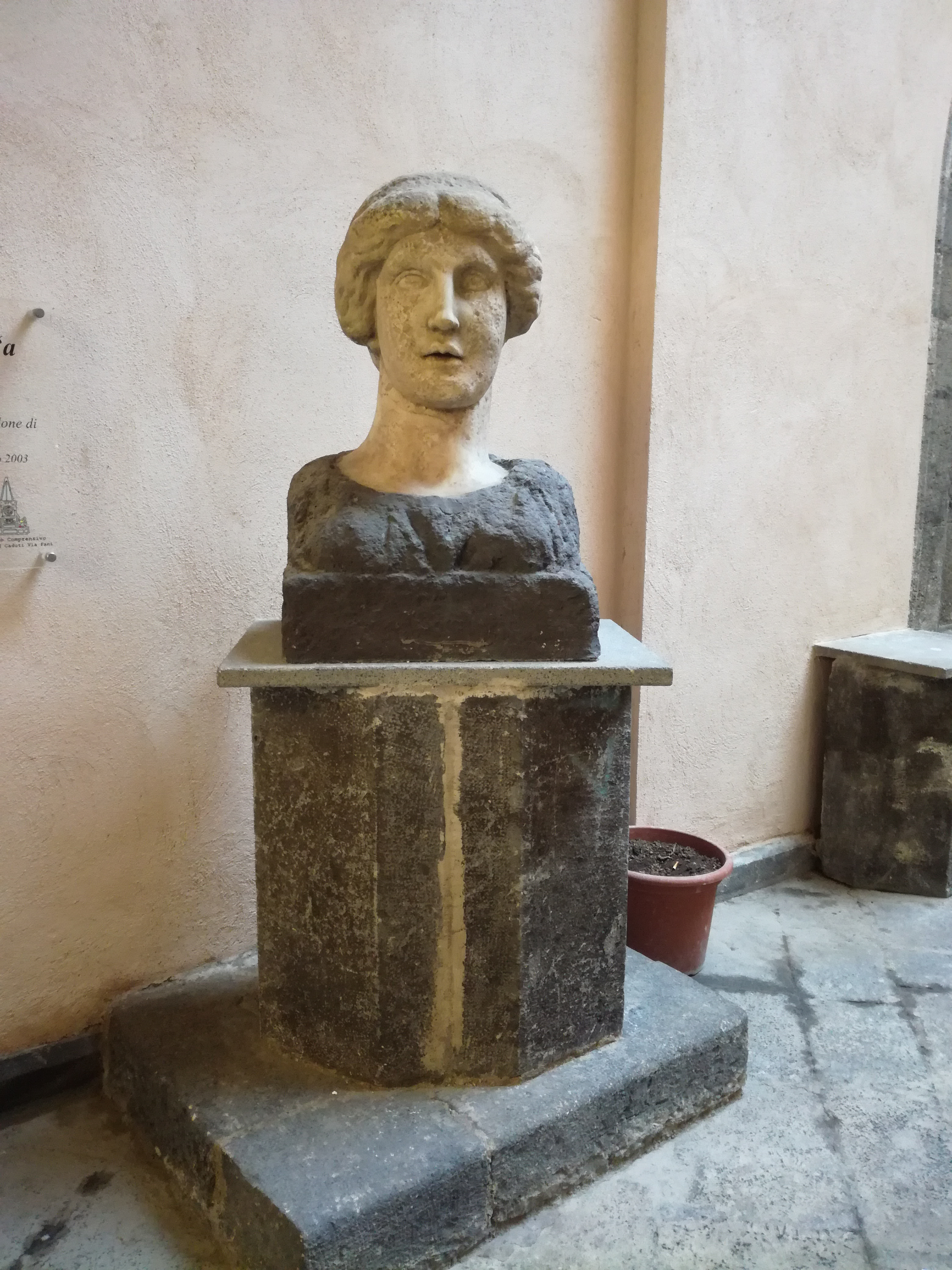 Ingresso, San Giovanni a Mare